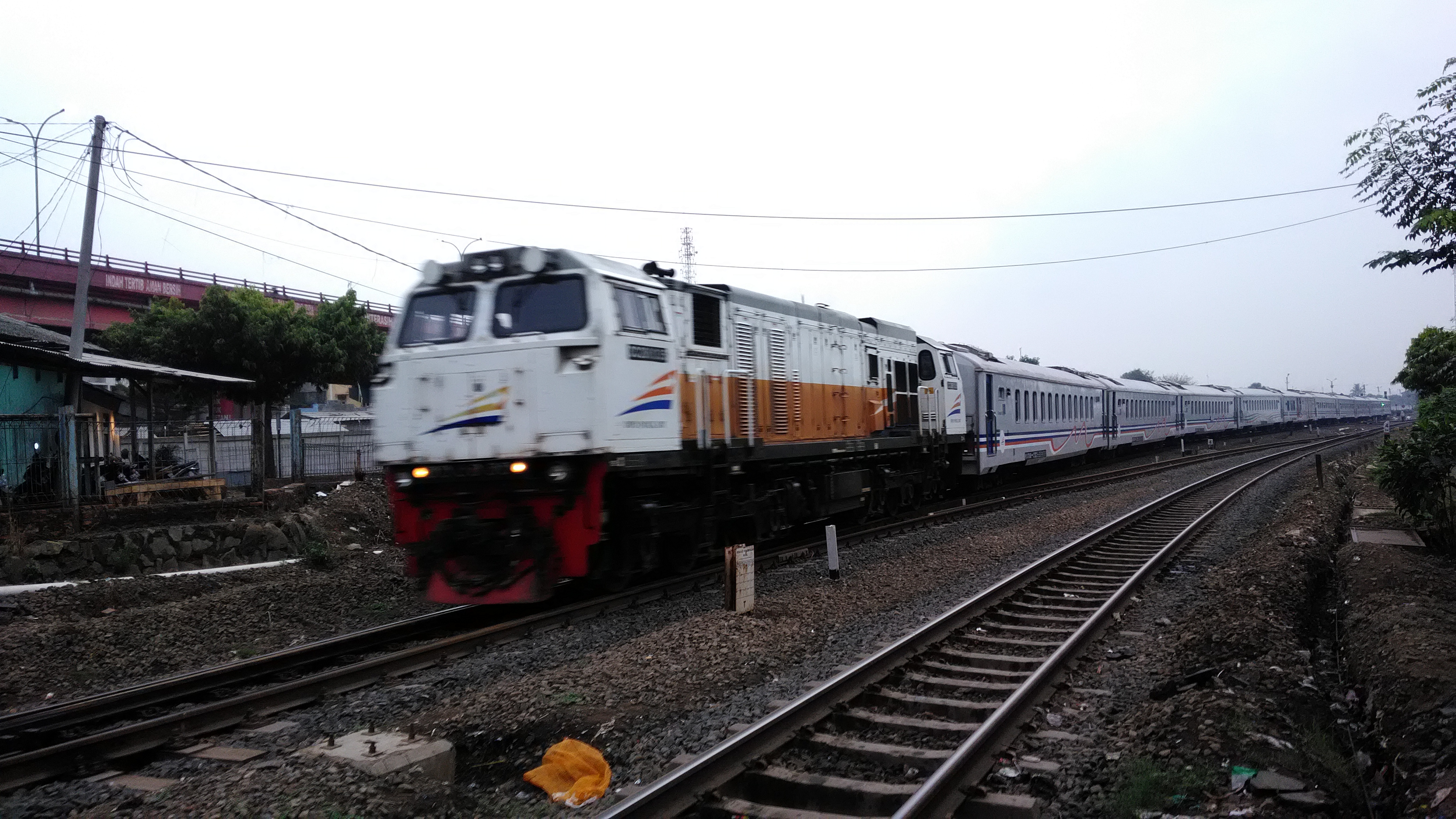 Sunda: KA Anjasmoro ngaliwat JPL 1 Cikampék